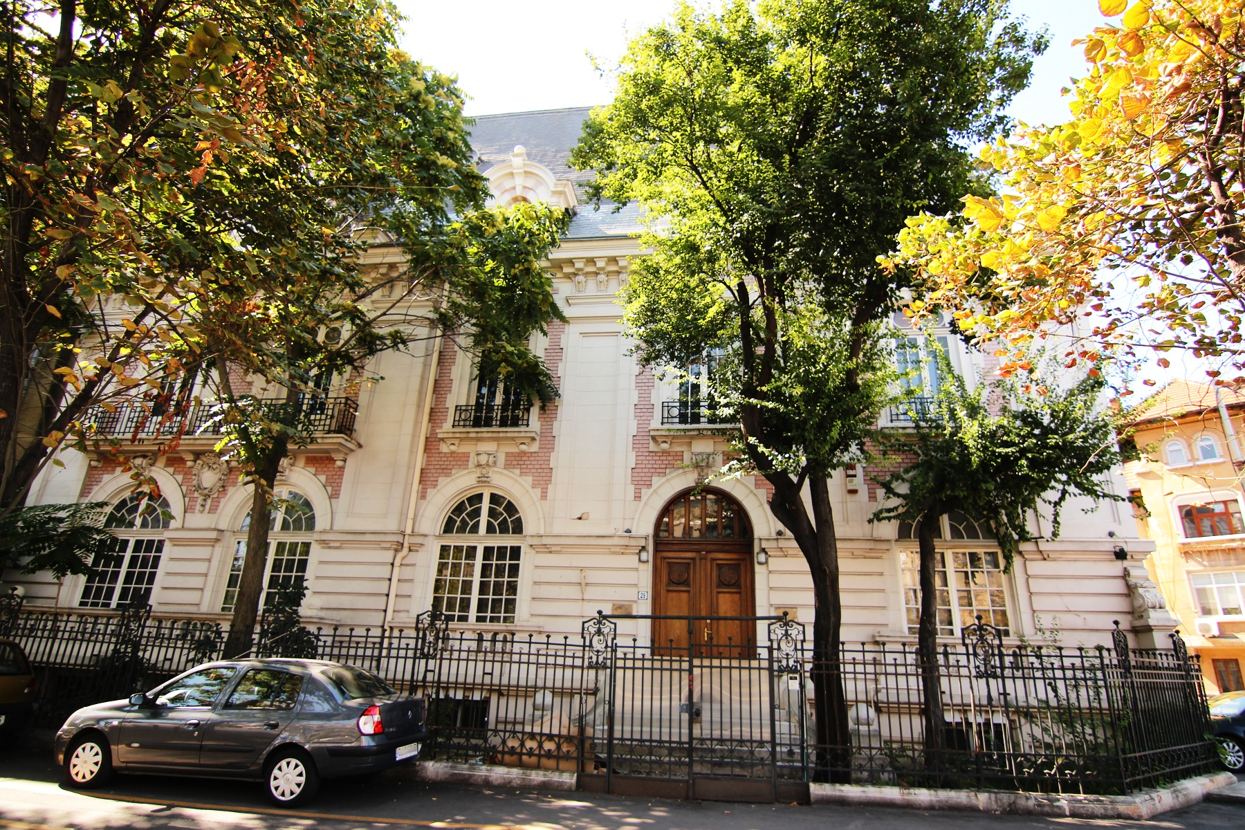 Casa Henri Coandă